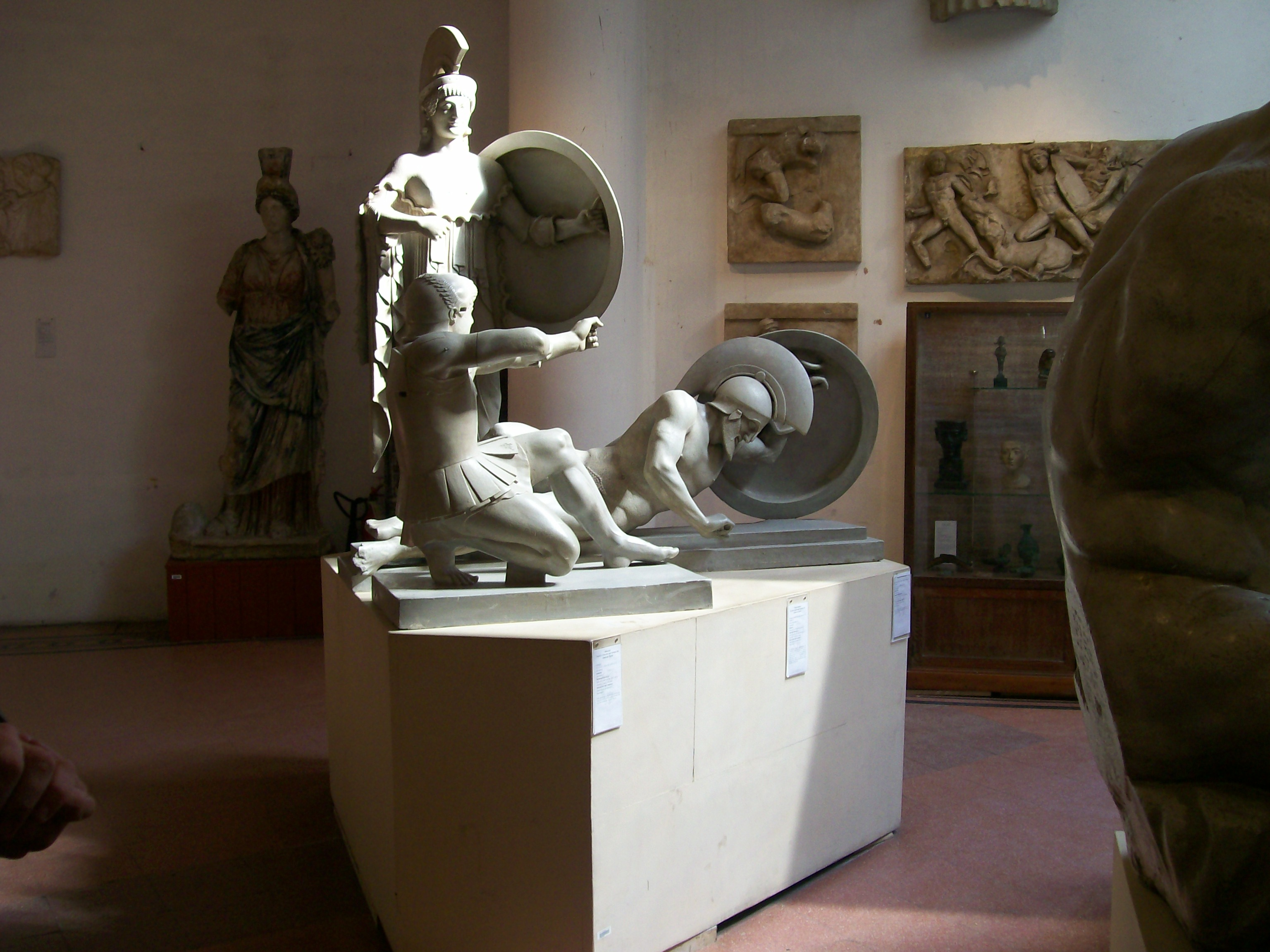 Museo de Calcos, Costanera Sur, Buenos Aires.